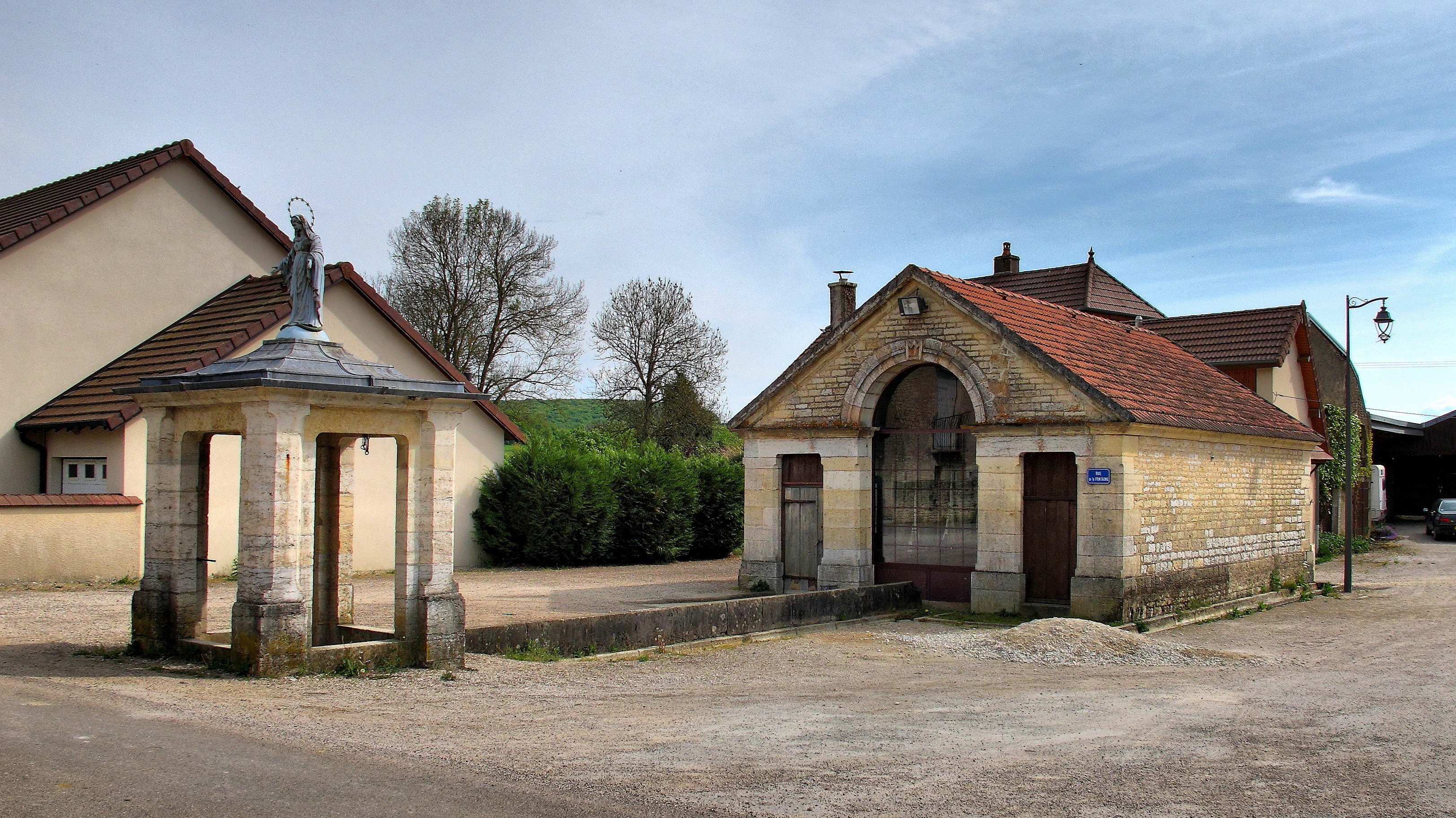 le lavoir-abreuvoir